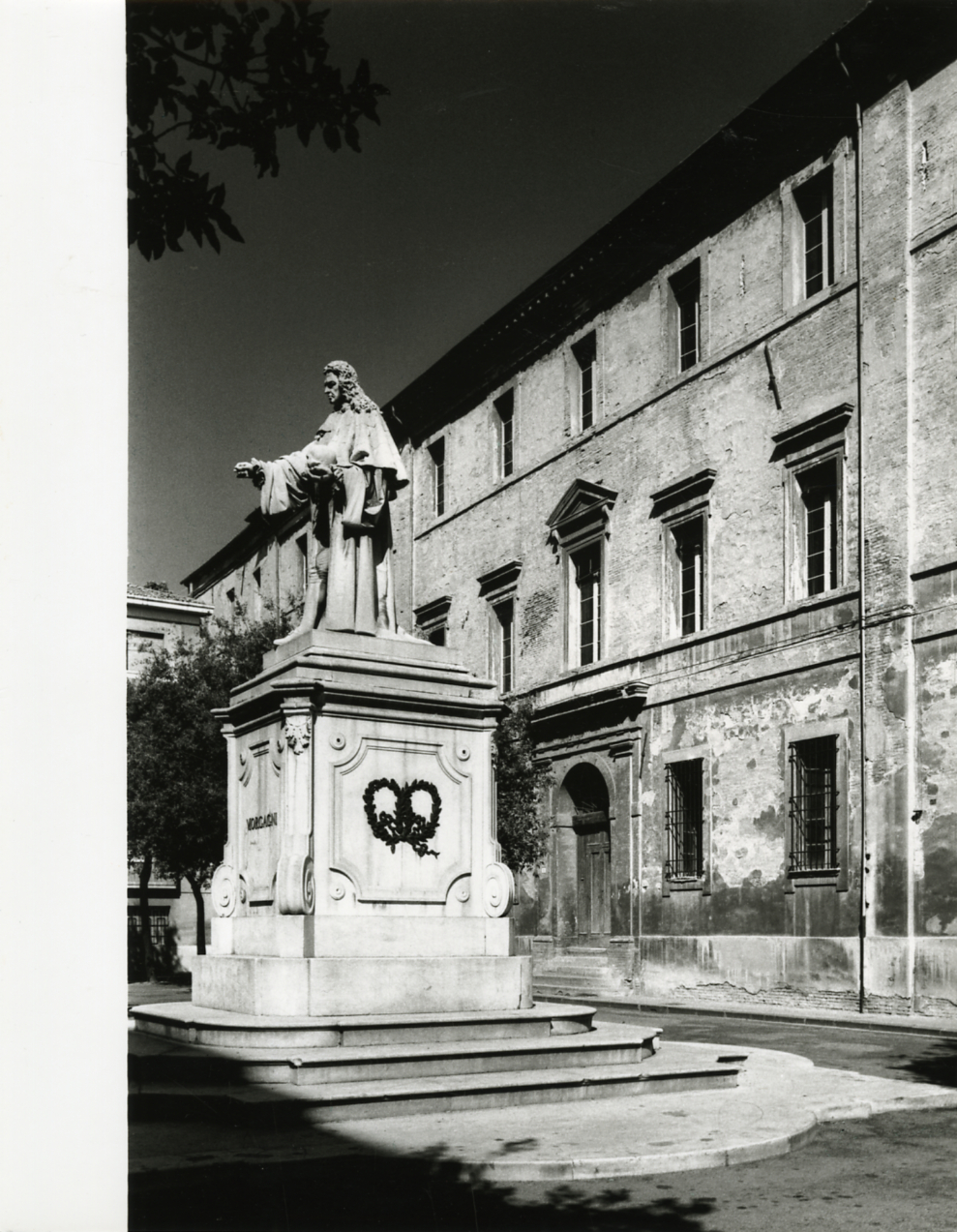 Servizio fotografico : Forlì, 1971 / Paolo Monti. - Stampe: 4 : Positivo b/n, gelatina bromuro d'argento/ carta, 24x30. - ((Al verso delle stampe manoscritti i numeri dei negativi corrispondenti: 1753/8, 1753/33, 1788/24. Sul coperchio della scatola, manoscritto a pennarello: "Emilia. Centri Storici. Forlì". - Occasione: Campagna di rilevamento del centro storico. - Fonte: Fattura di Paolo Monti: IV. Commesse/ Fattura/ Rilevamento fotografico delle Valli del Rabbi, Bidente e Montone (1971/12/27), presso Archivio Paolo Monti. N. 400 fotografie con copia 24x30. Tutto il materiale è stato consegnato ai Signori Arch. Foschi e Venturi.